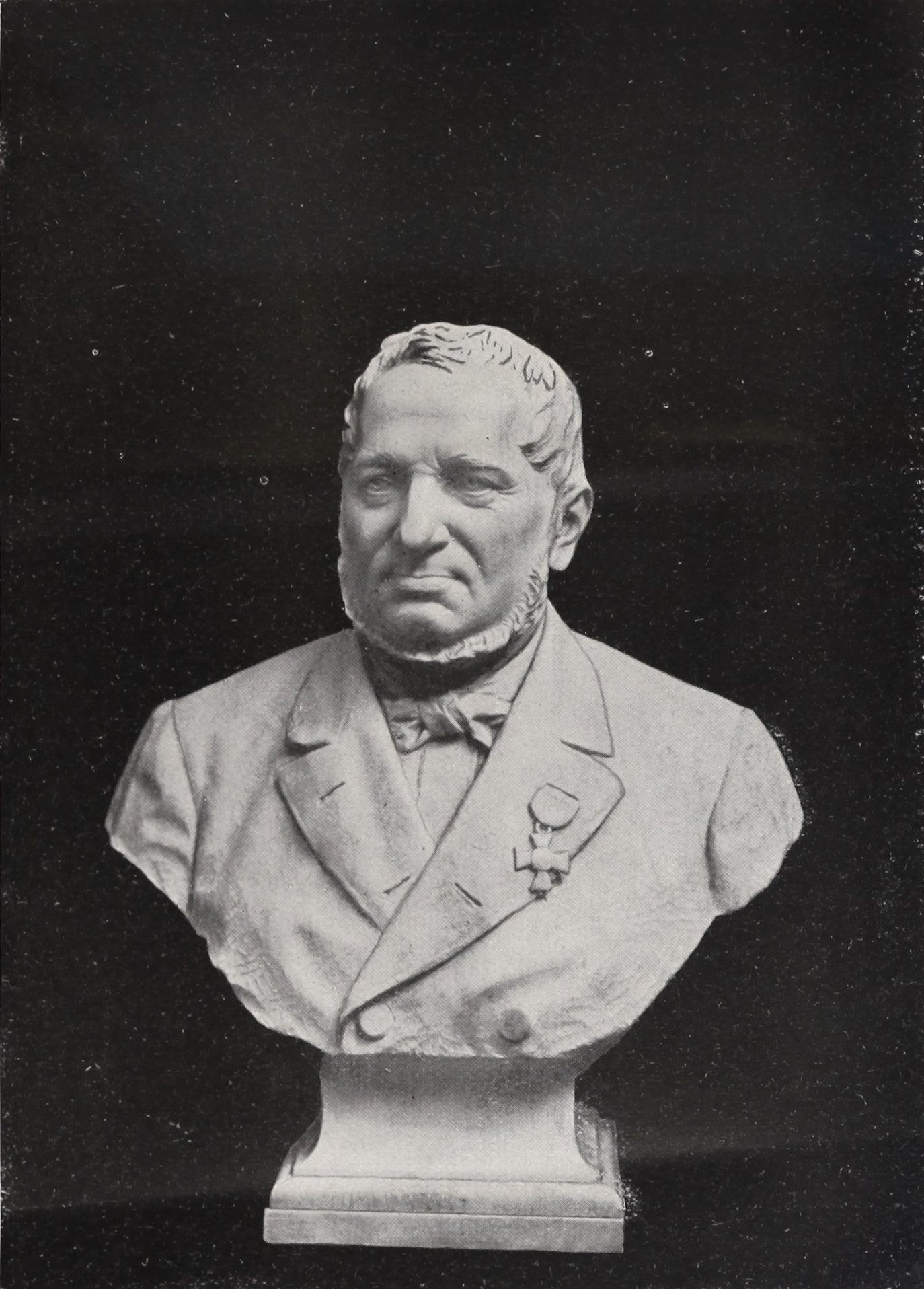 ZPB "Frotex" w Prudniku (dawniej "S. Fränkel"), 1932.